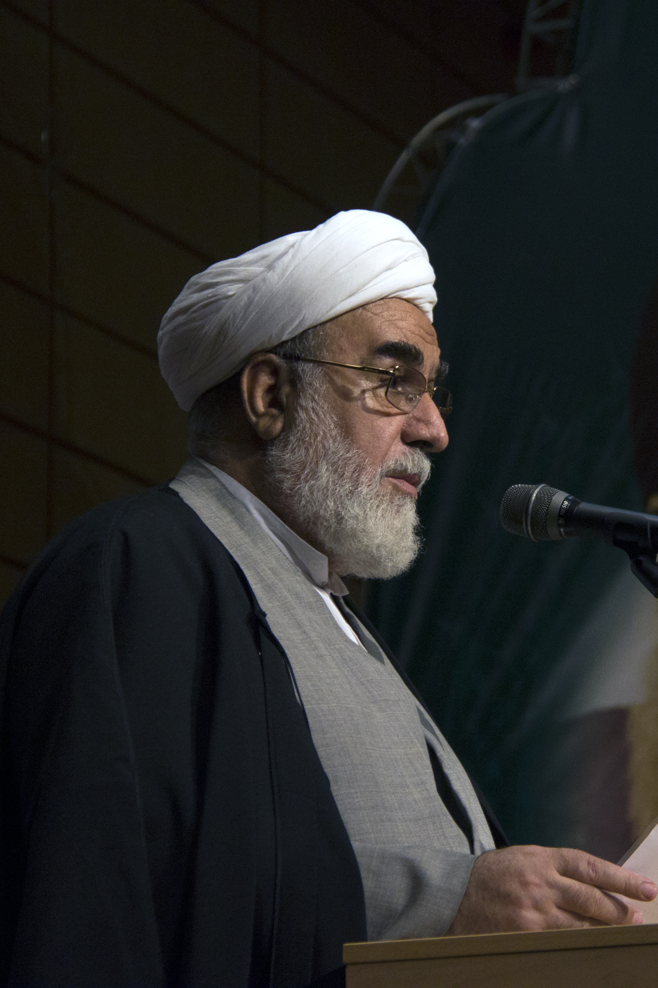 محمد محمدی گلپایگانی (زاده ۱۳۲۲، گلپایگان) فرزند ابوالقاسم محمدی گلپایگانی، از رجال شاخص سیاسی و مذهبی در جمهوری اسلامی ایران[نیازمند منبع] و رئیس دفتر سیدعلی خامنه‌ای از ۱۳۶۸ تا کنون است.